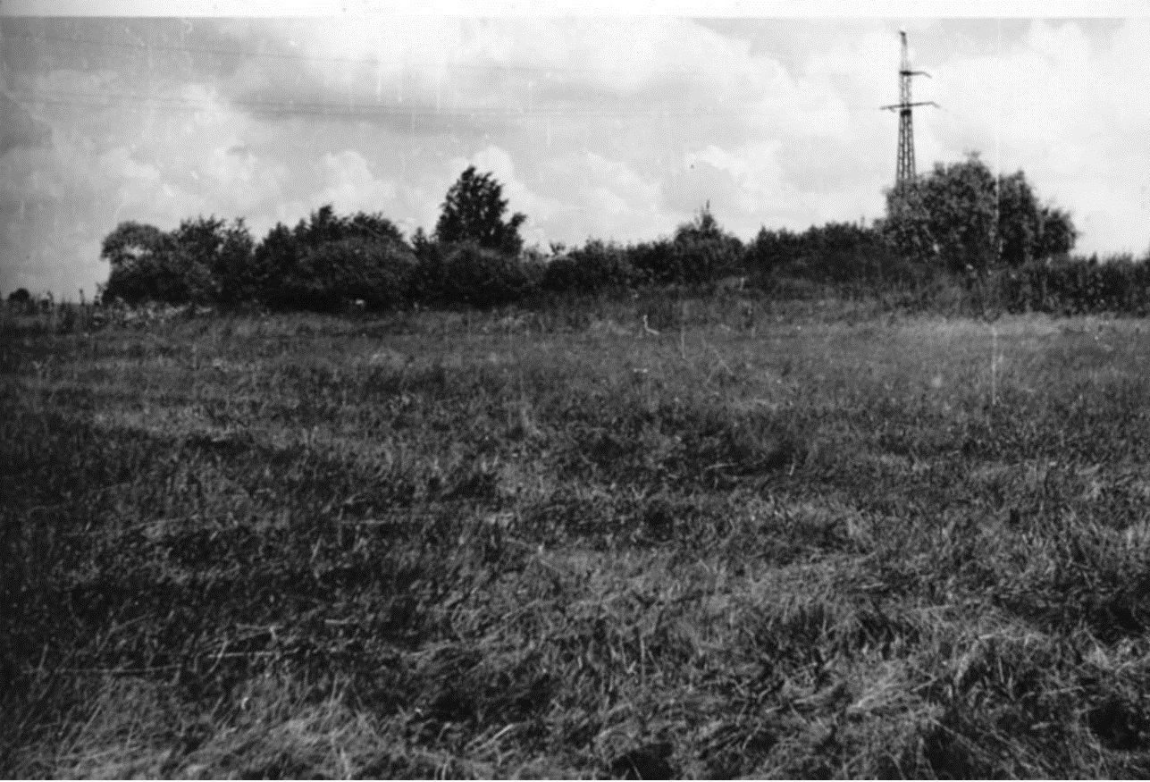 Pyragių kapinynas 1984 m.